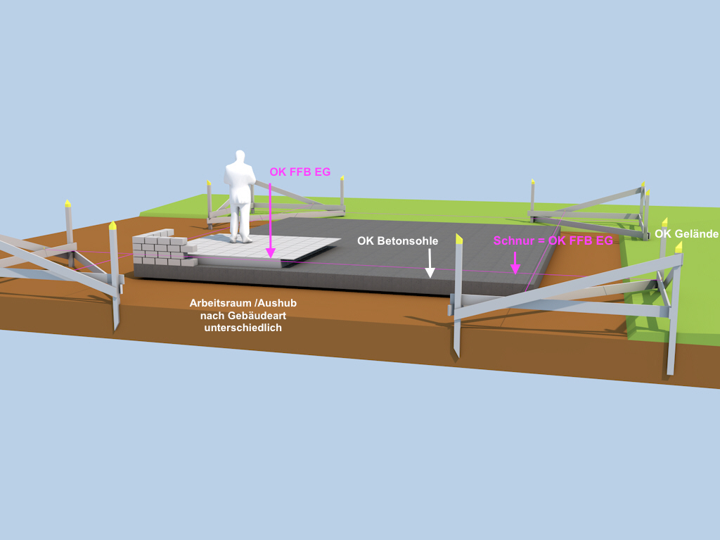 Schnurgerüst 3D Animation